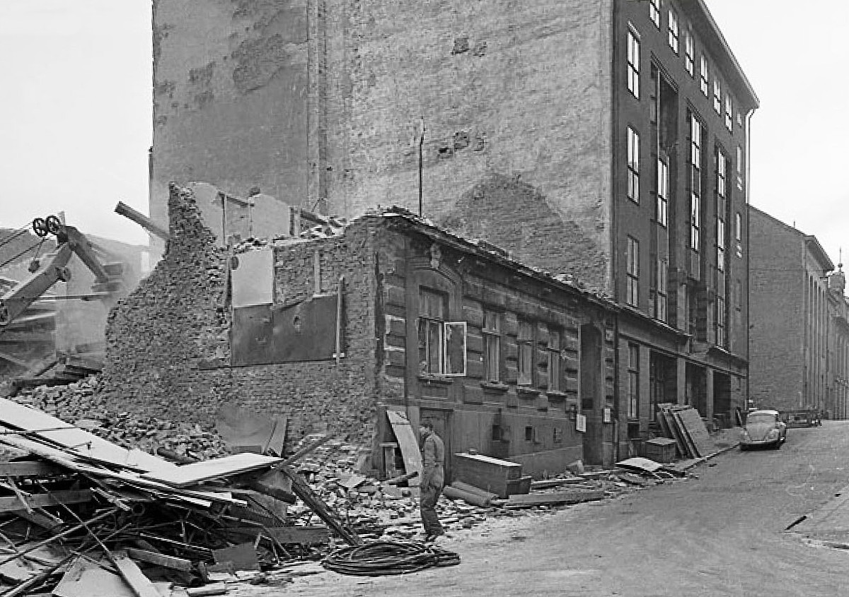 Norra Smedjegatan 34-30. Vy från Hamngatan söderut vid rivning av Norra Smedjegatan 34. Här ligger Gallerian idag.